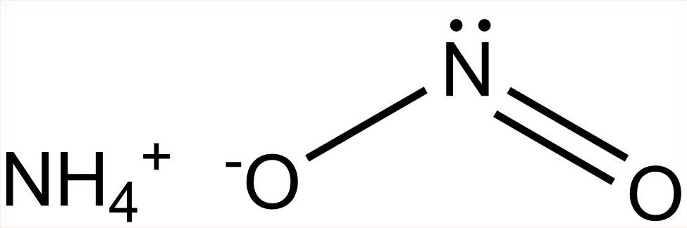 Ammonium Nitrite 2D molecular model